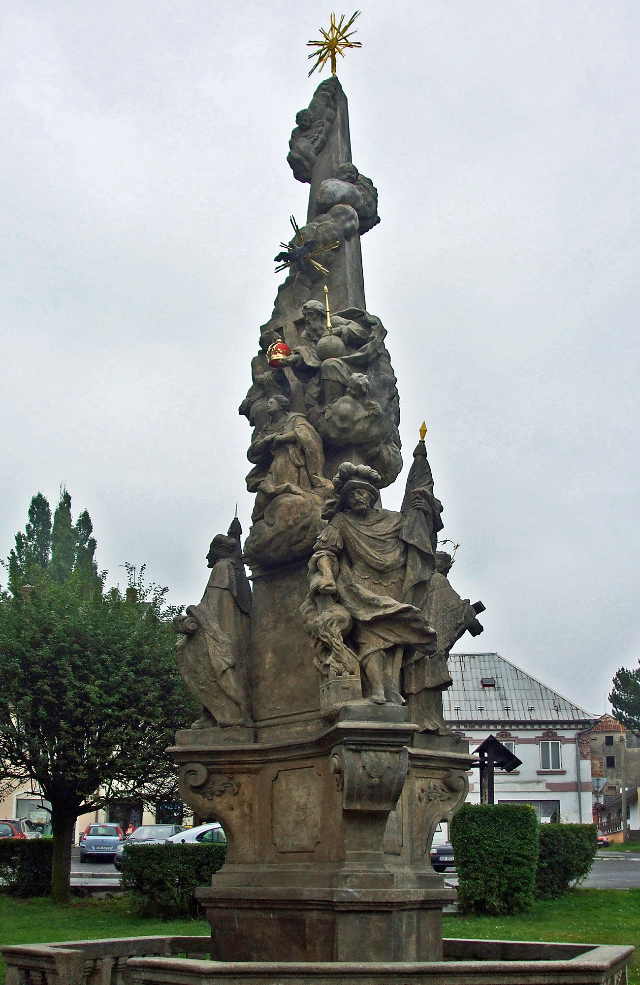 Šluknov, náměstí Míru, morový sloup